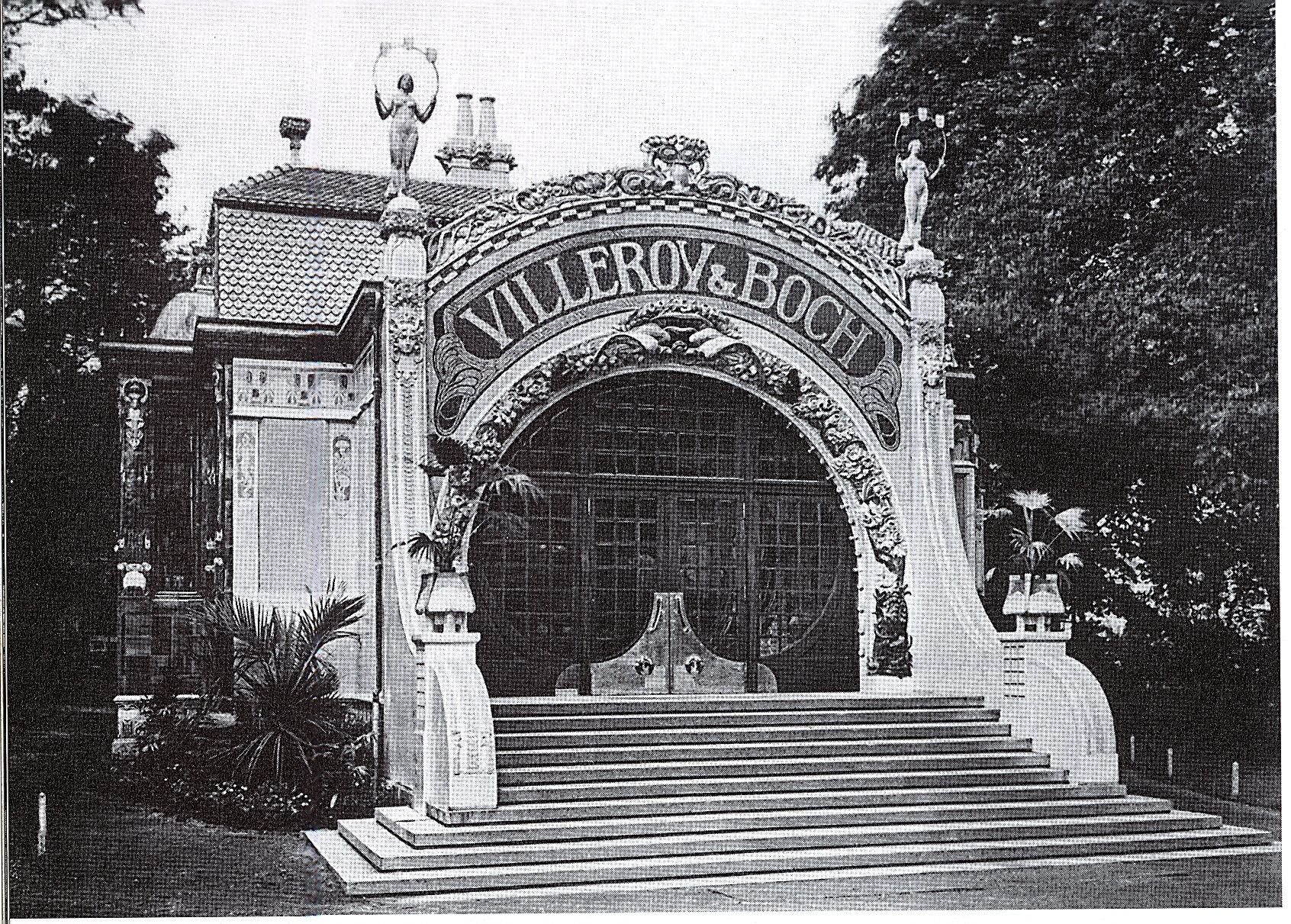 Düsseldorf, Majolikahäuschen von Villeroy & Boch im Düsseldorfer Hofgarten, erbaut nach Entwürfen von Anton Joseph Pleyer im Jahre 1902, abgebrochen 1926, 1.jpg